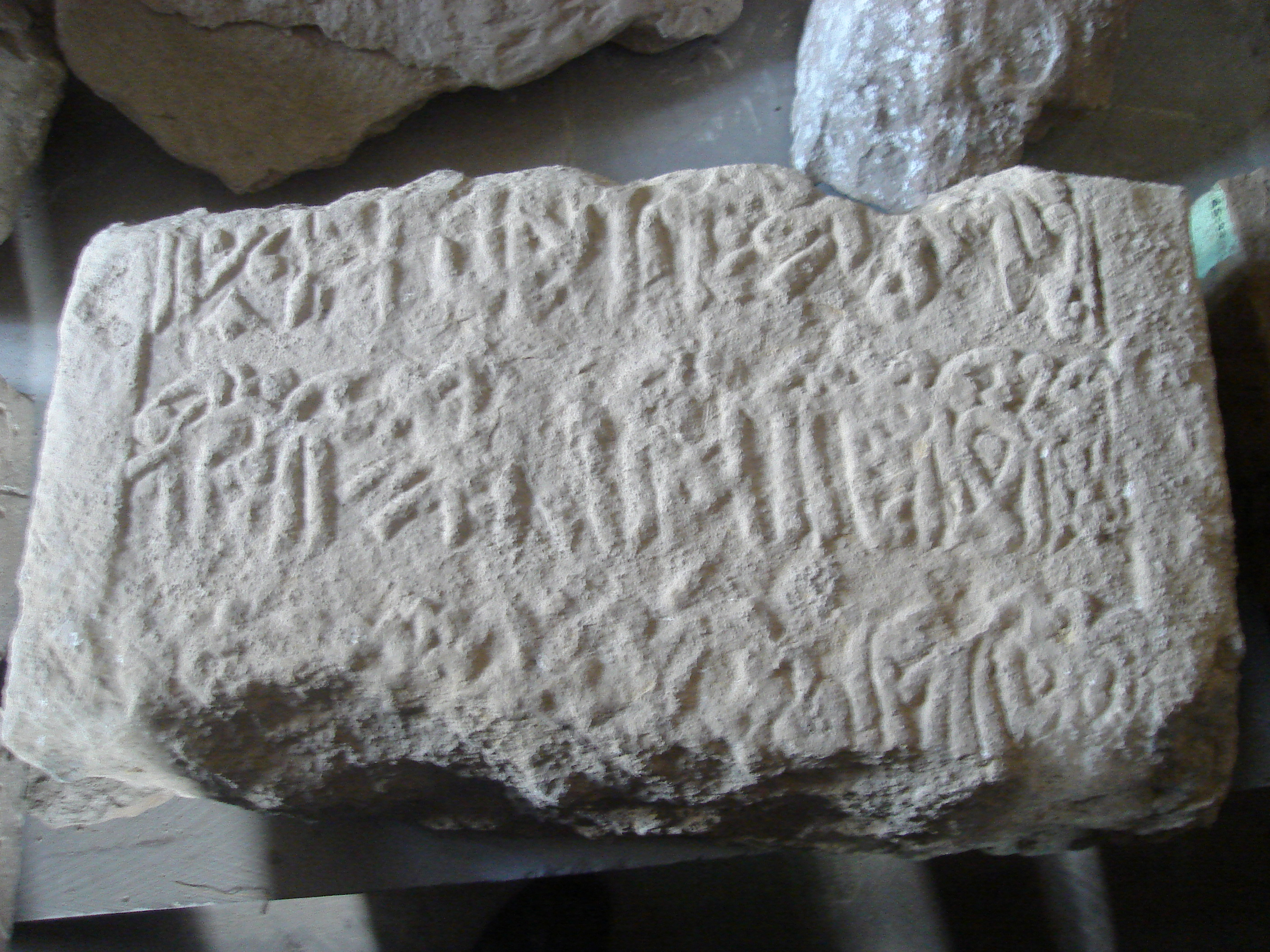 Gravestone